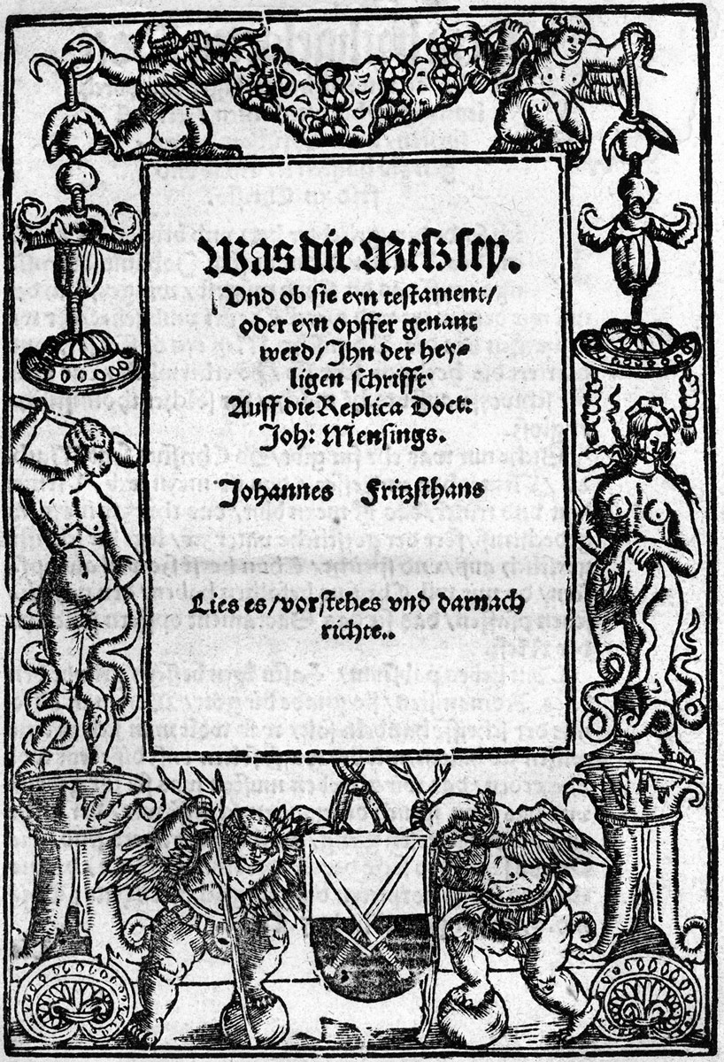 Johannes Fritzhans: Was die Mess sey. Und ob sie eyn testament, oder eyn opffer genant wird, Jhn der heyligen schrifft. Auff die Replica Doct: Joh: Mensings, [Magedeburg], Heinrich Öttinger, 1527. Erste Ausgabe unter diesem Titel, zweite des Werks.